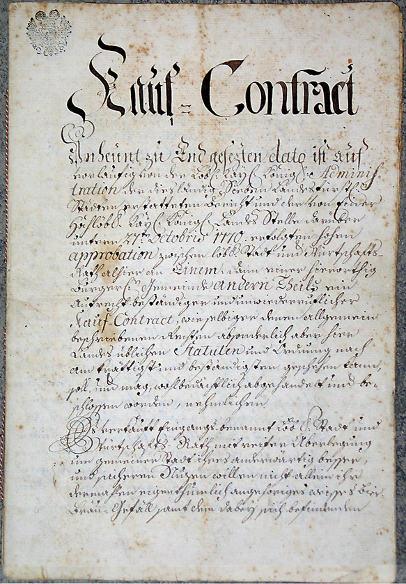 Urkunde Gründung Freistädter Bier um 1770 - Seite 1